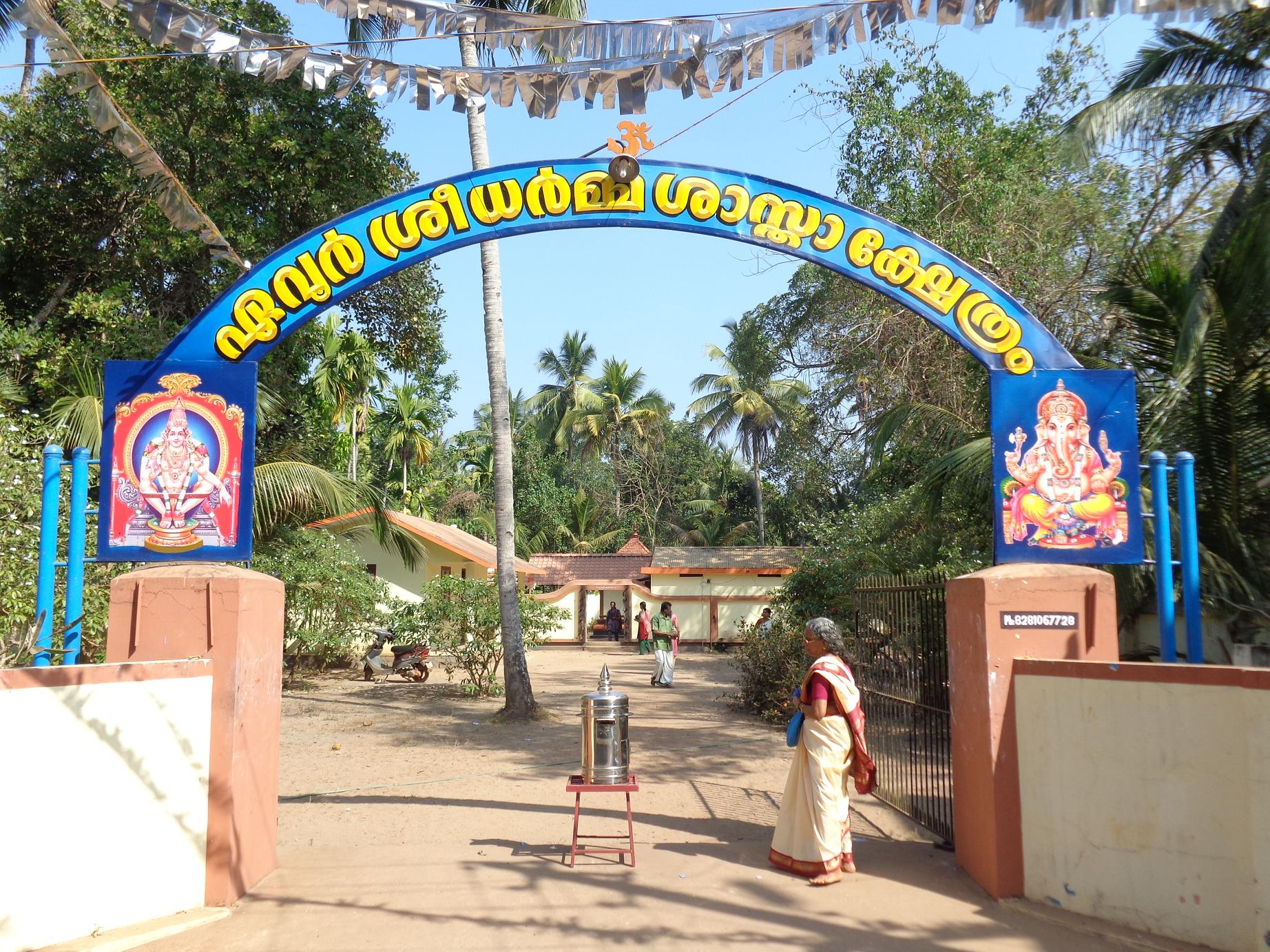 ഏവൂർ ശാസ്താക്ഷേത്രം കമാനം